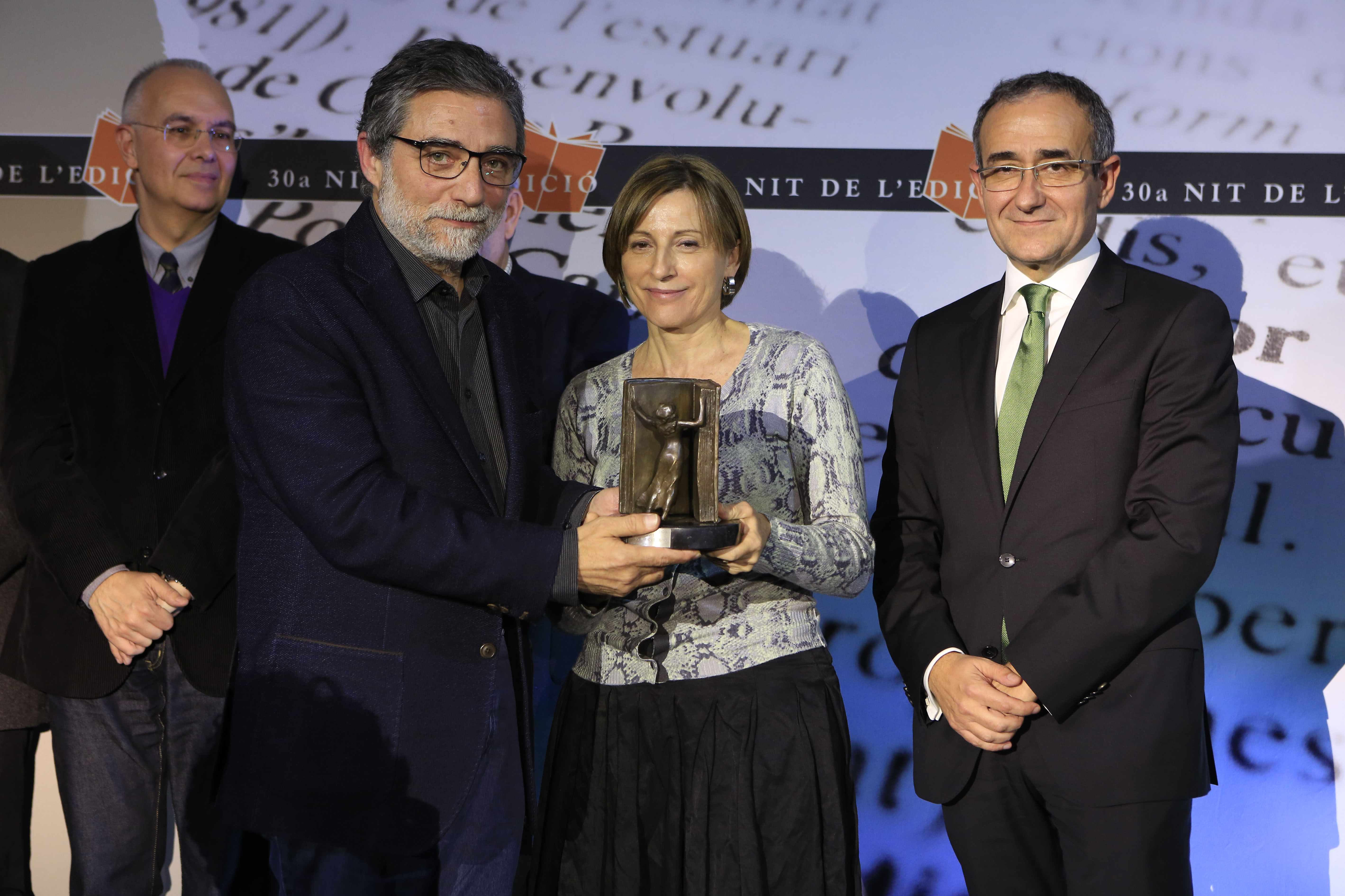 Premi Atlàntida a Jaume Plensa, en la Noche de la Edición del Gremio de Editores de Cataluña de 2016